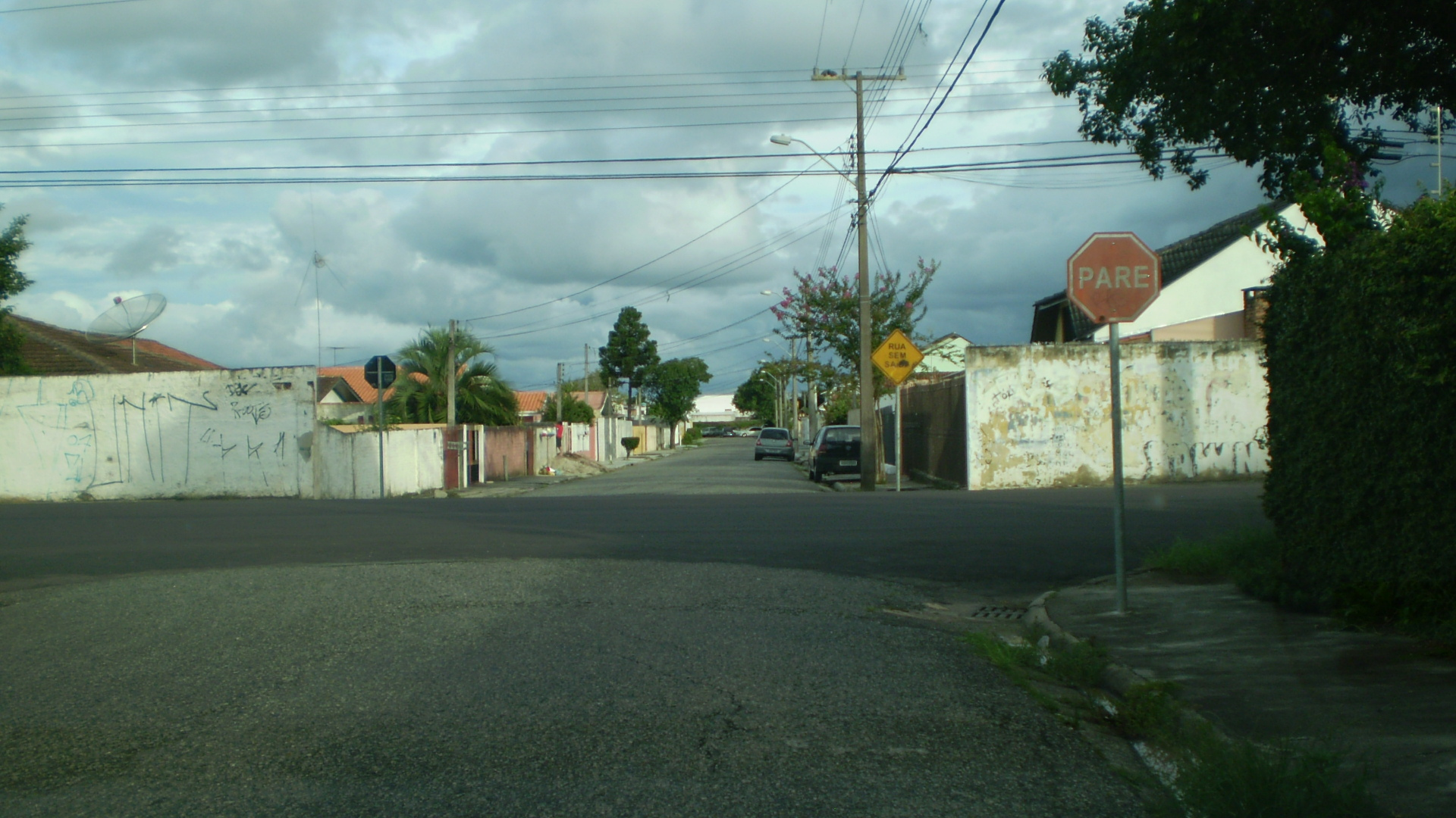 Rua Reverendo Raul Rodrigues de Castro - Curitiba